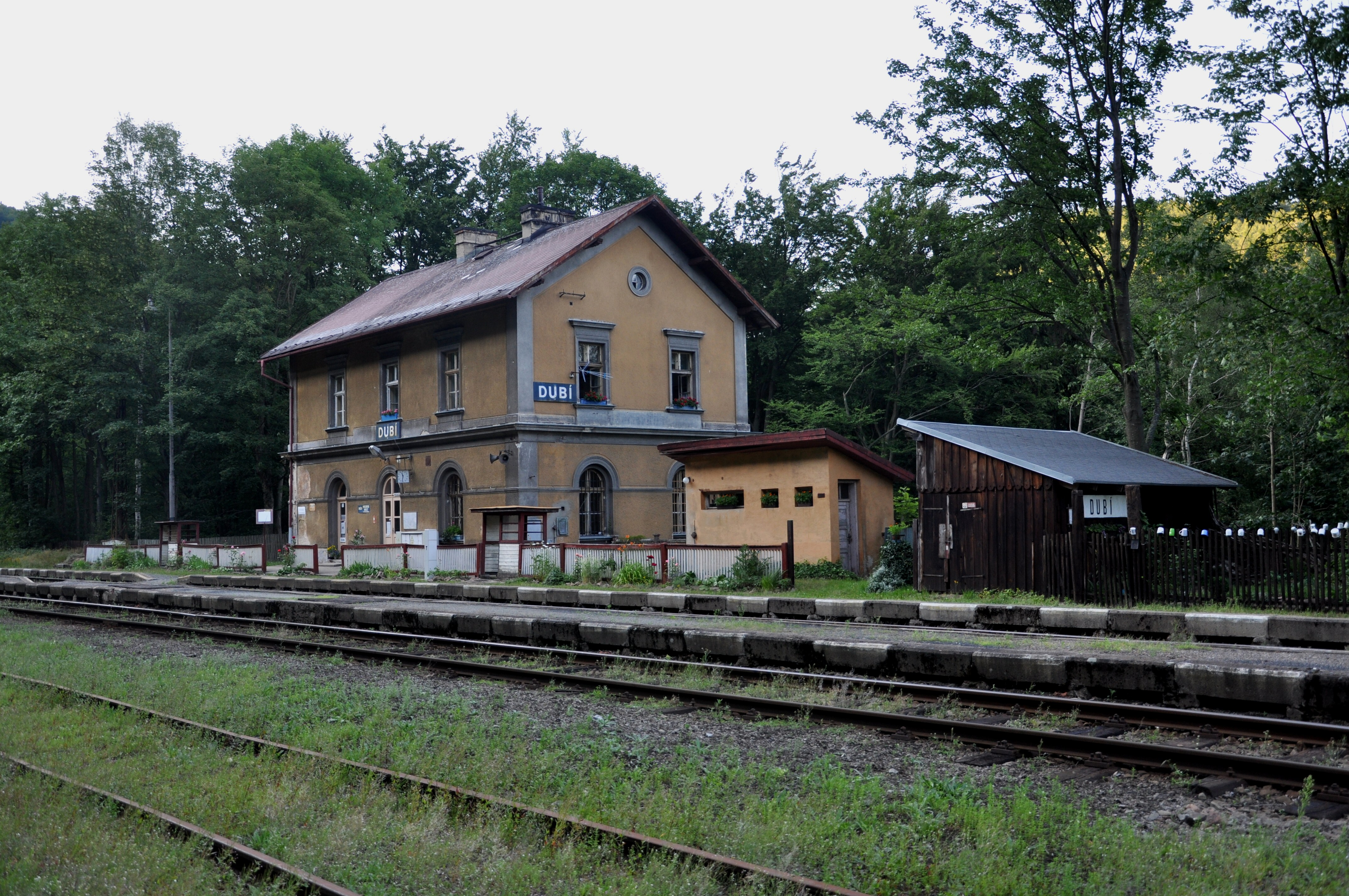 Bahnhof Dubí der Bahnstrecke Most–Moldava, Tschechien